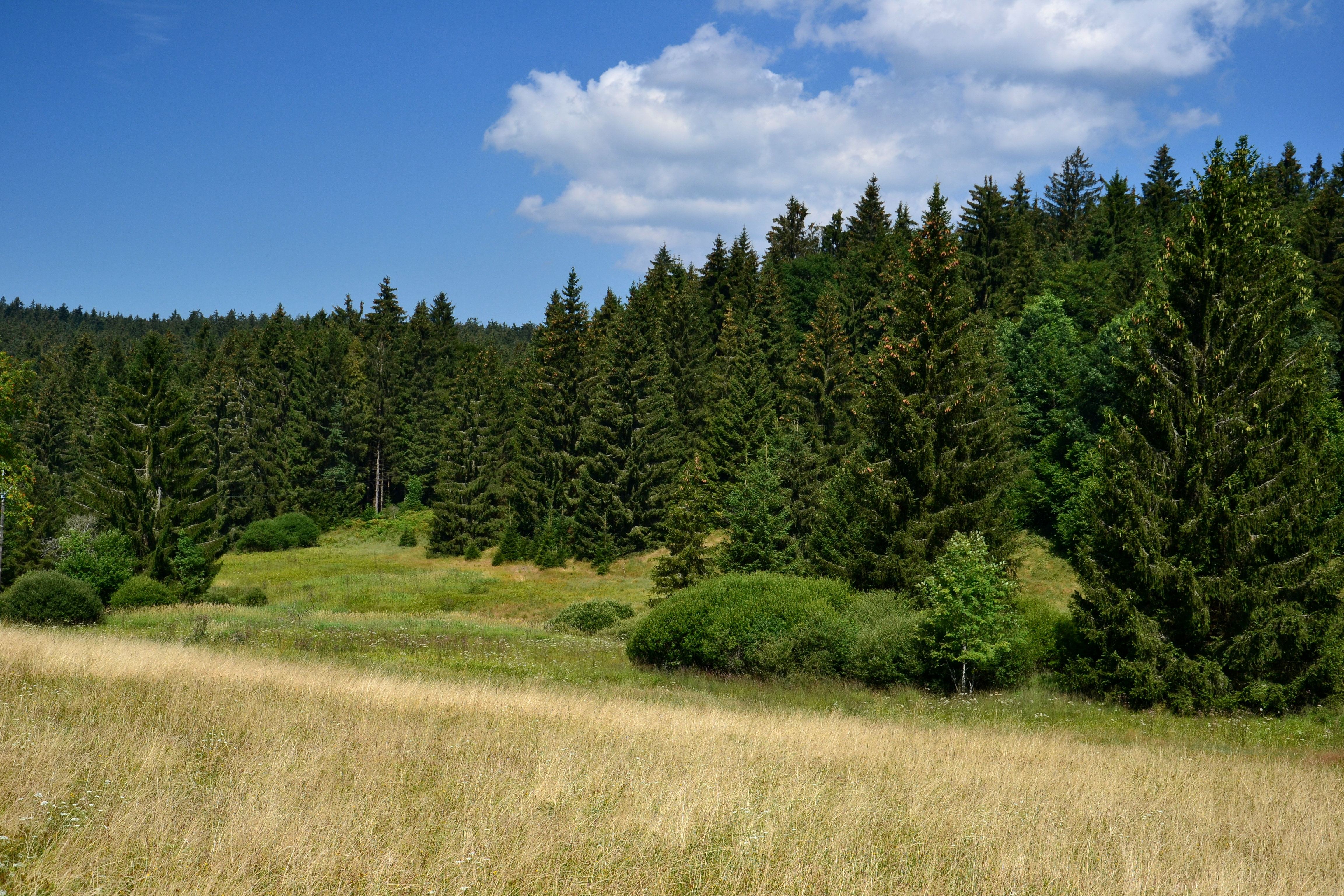 Severní část přírodní rezervace